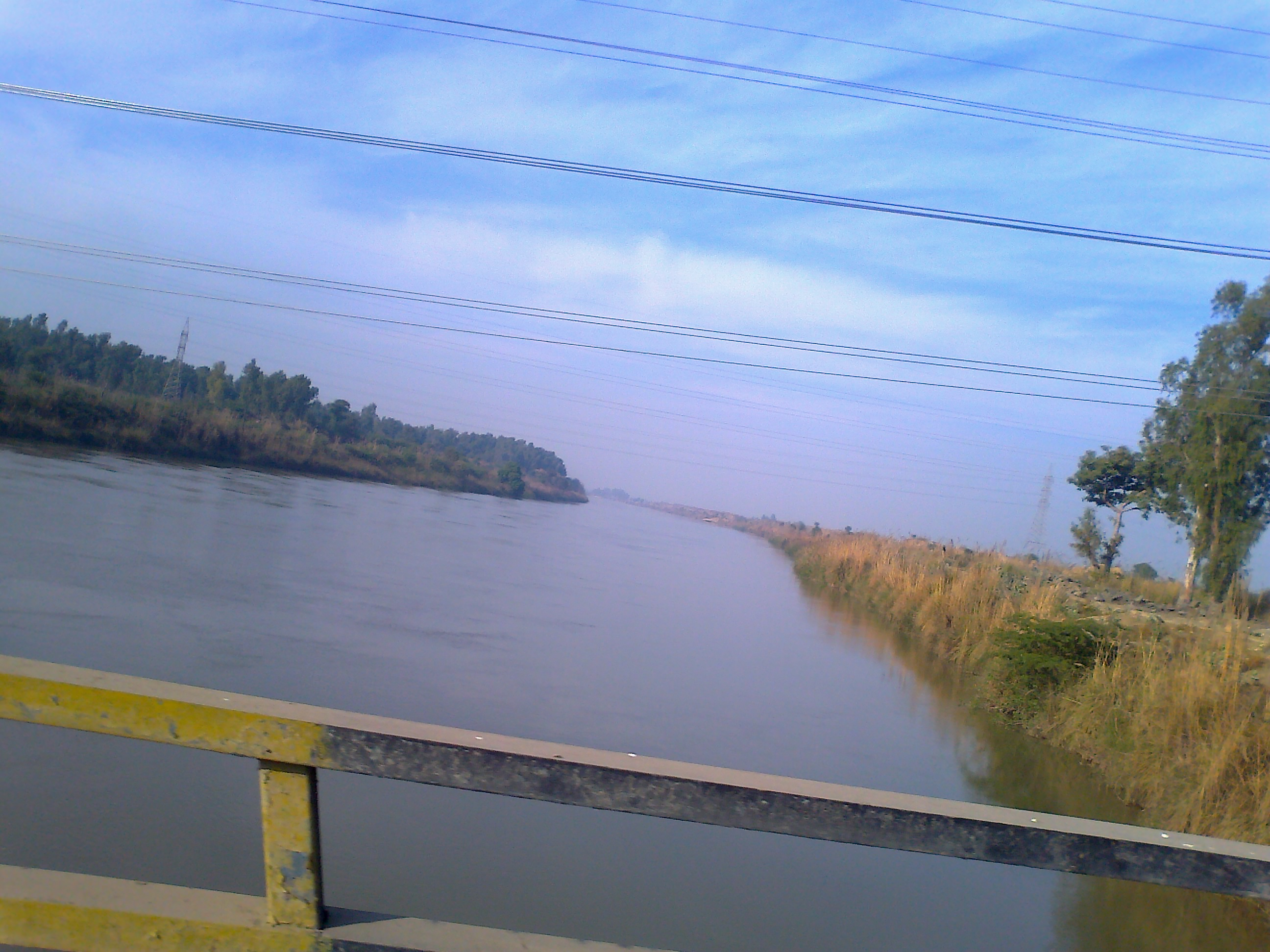 canal